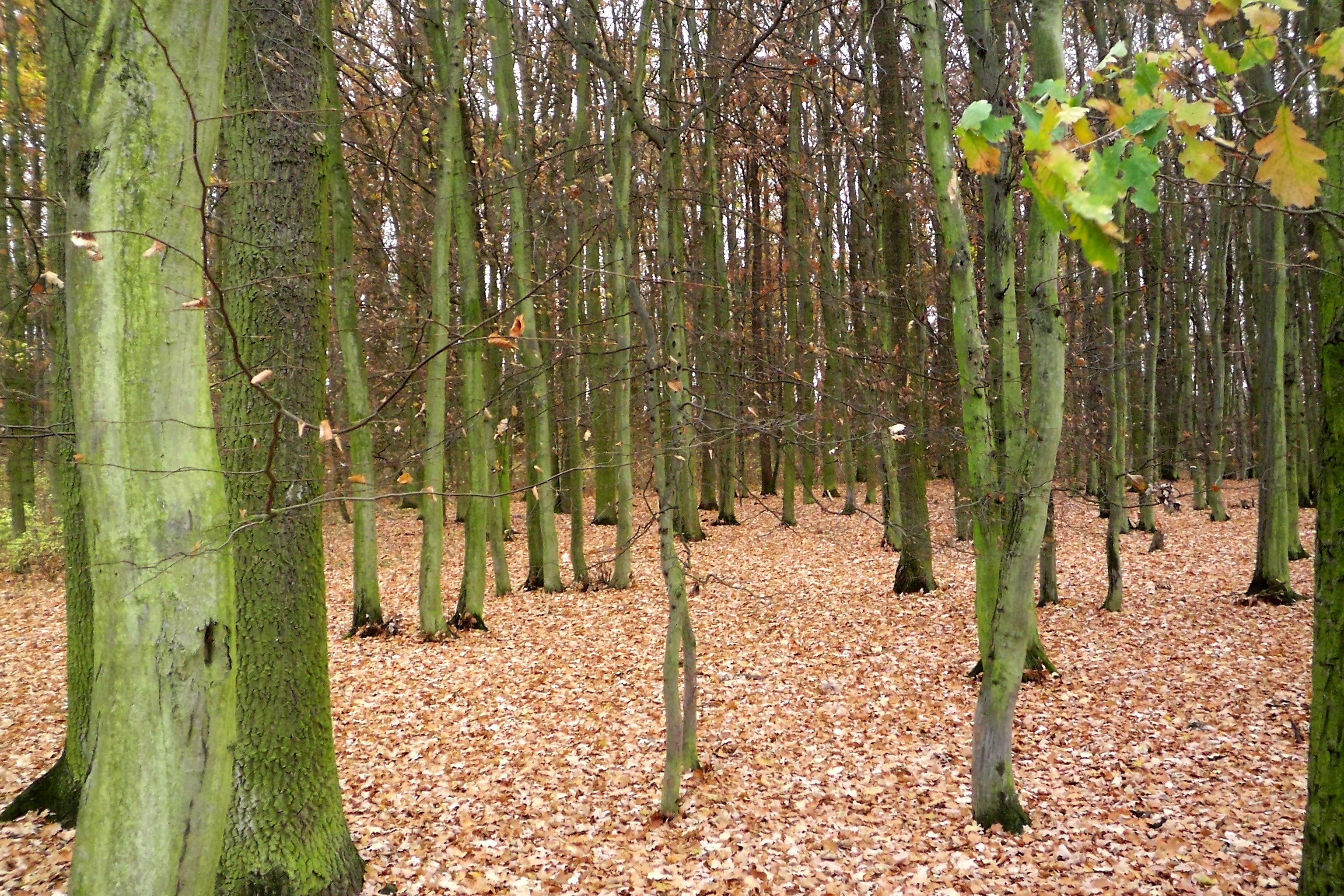 Celkový pohled na míru zakmenění porostu uvnitř rezervace.